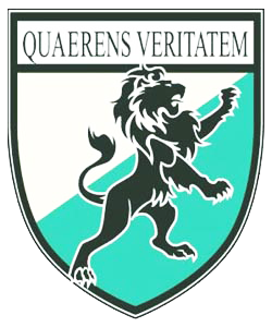 Diseño inspirado en el logo de la UDH